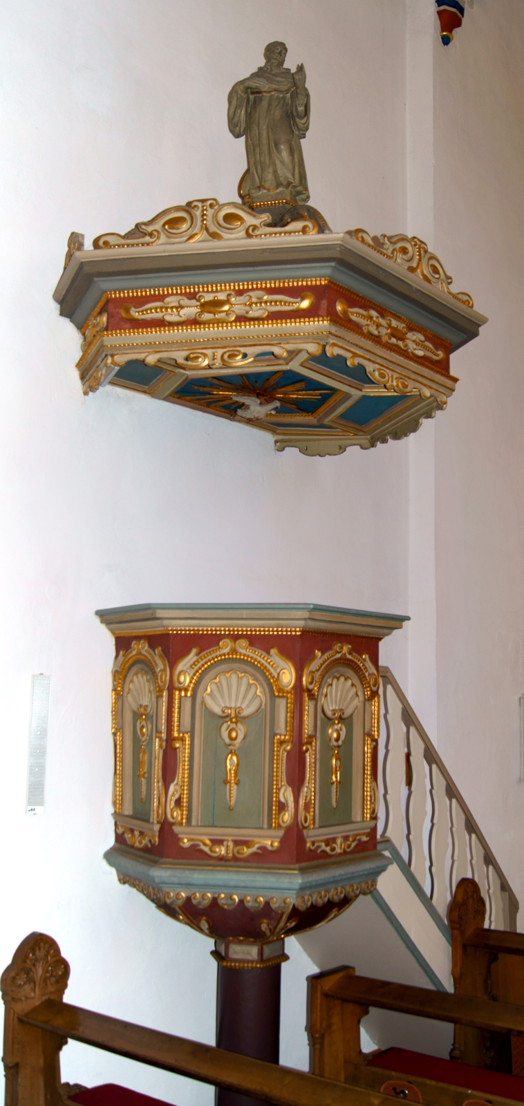 Die aus der ersten Hälfte des 17. Jahrhunderts stammende Kanzel der Klosterkirche St. Marien in Burlo. Der Schalldeckel trägt die Figur eines Zisterziensers, möglicherweise den Hl. Bernhard von Clairvaux darstellend. This is a photograph of an architectural monument. A1 - A 26